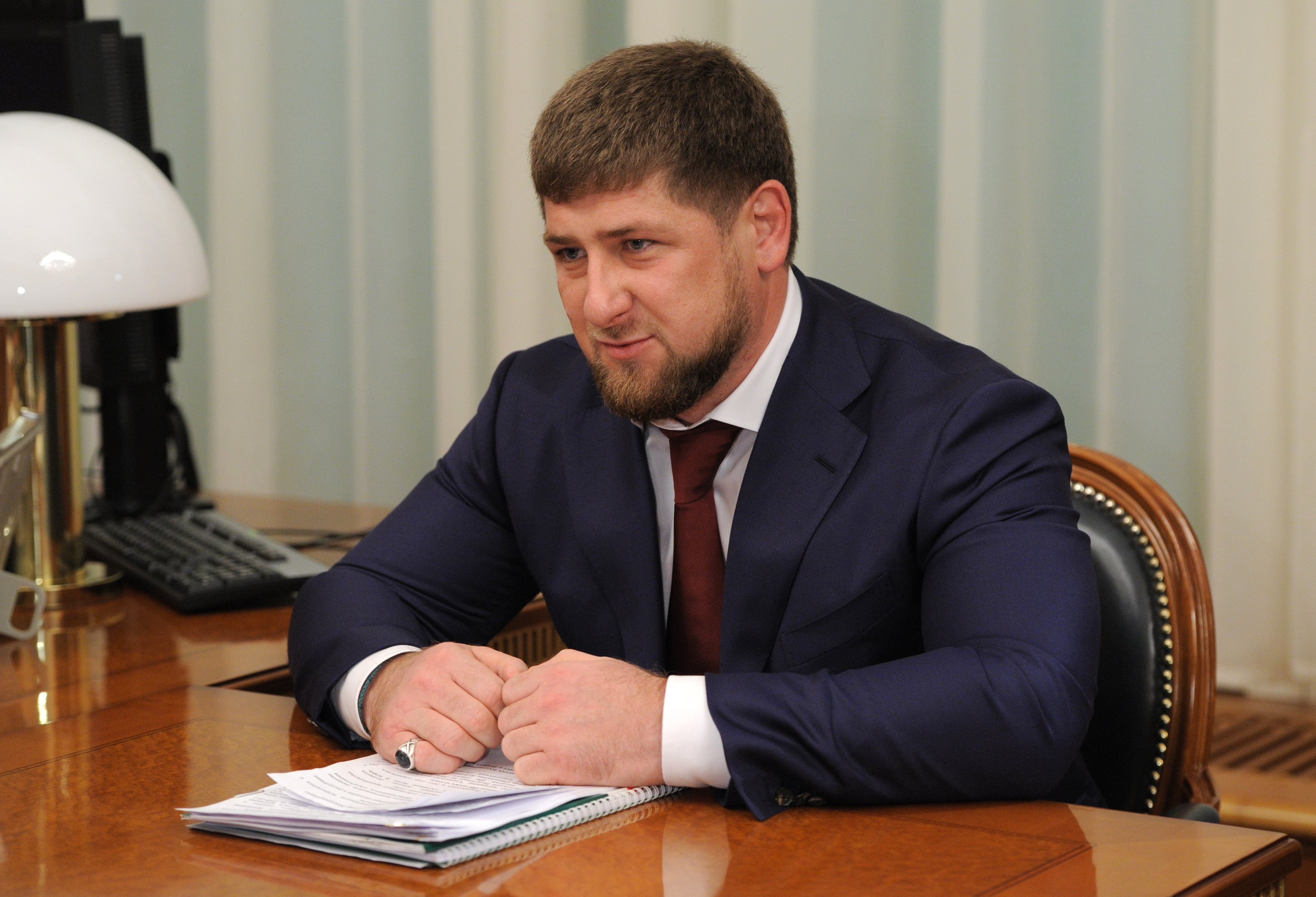 Глава Чеченской Республики Р.А.Кадыров на встрече с Председателем Правительства Российской Федерации В.В.Путиным